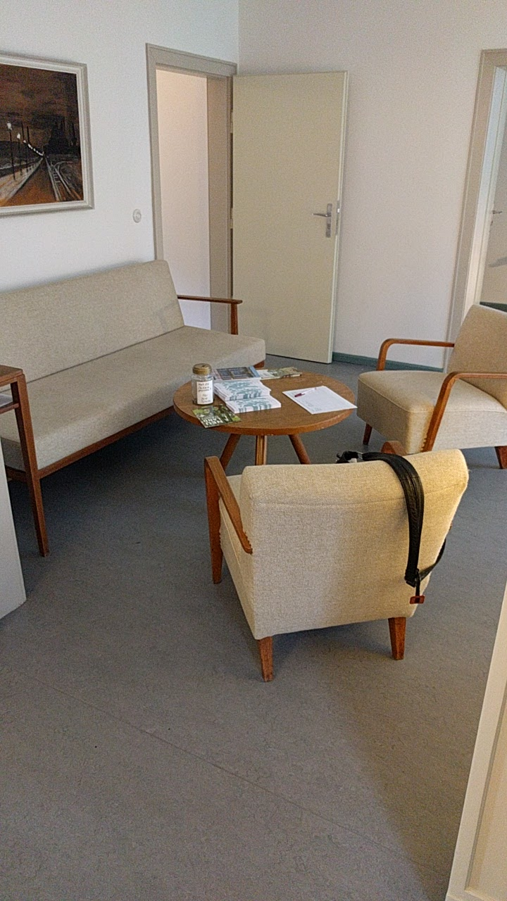 Sitzgruppe, 1950/51 entworfen von Ida Falkenberg-Liefrinck für das Haus des Malers Max Lingner, Max-Lingner-Haus, Intelligenzsiedlung, Berlin-Pankow.